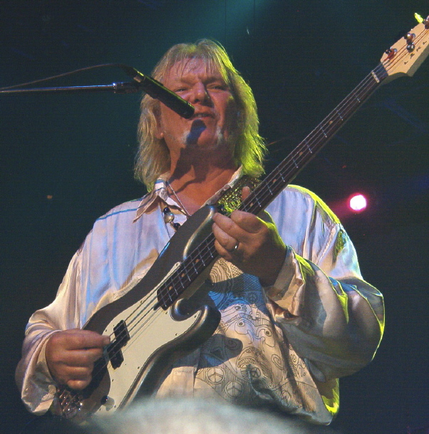 Chris Squire (Yes)